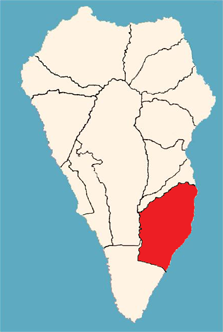 Ubicación del municipio de la Villa de Mazo